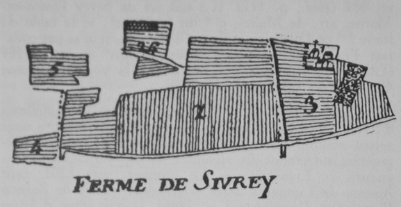 issue des archives.